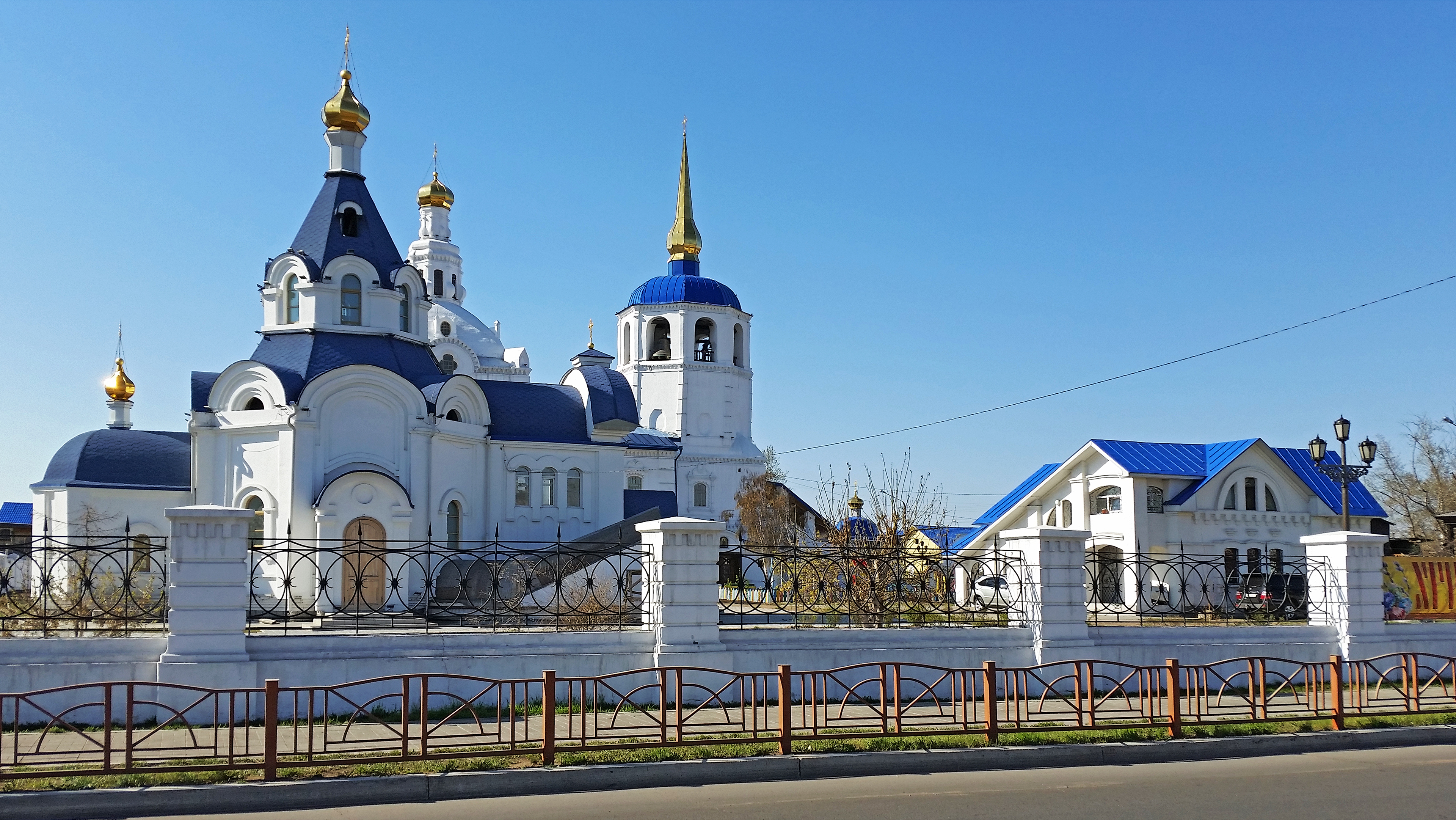 Собор Одигитриевский: улица Ленина, 4, Улан-Удэ, Бурятия